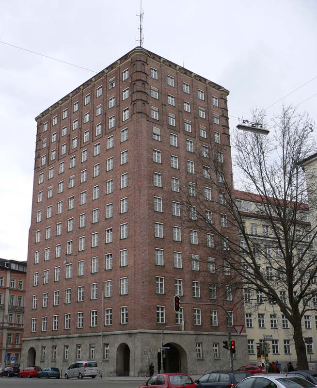 Altes Technisches Rathaus der Stadt München, Blumenstraße 28a/b